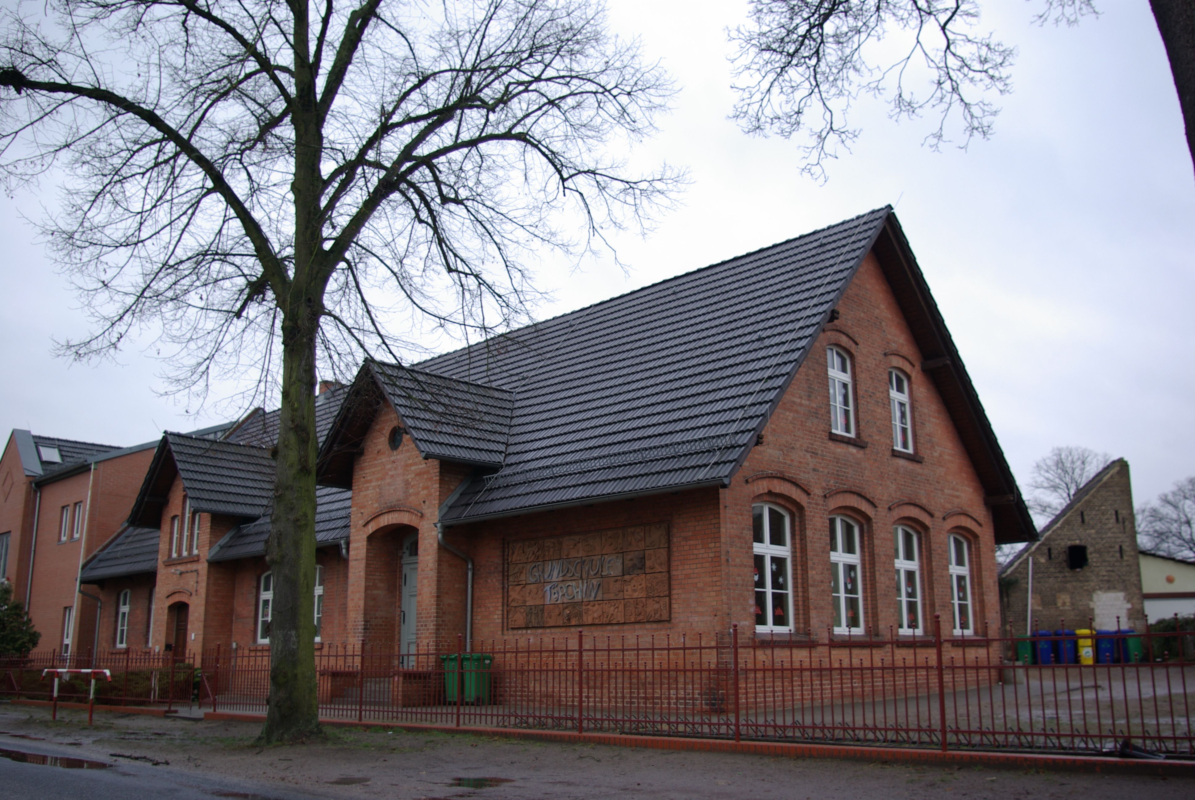 Mittenwalde Ortsteil Töpchin in Brandebburg. Die Schule steht unter Denmalschutz.